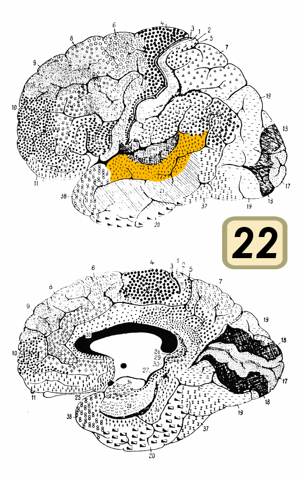 Brodmann area 22.